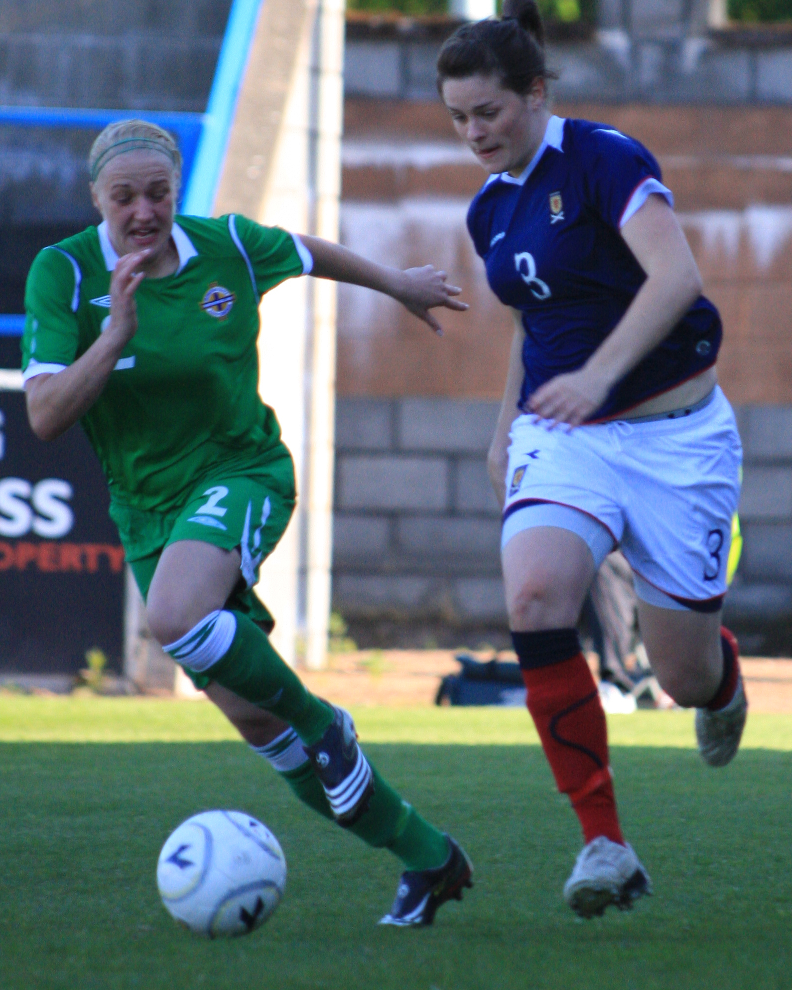 No. 3